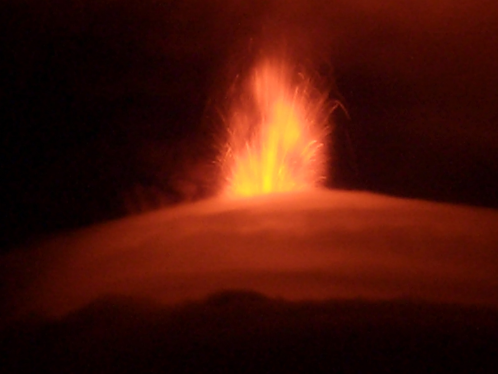 Volcán de Fuego, Guatemala. Erupcion 8 aug07